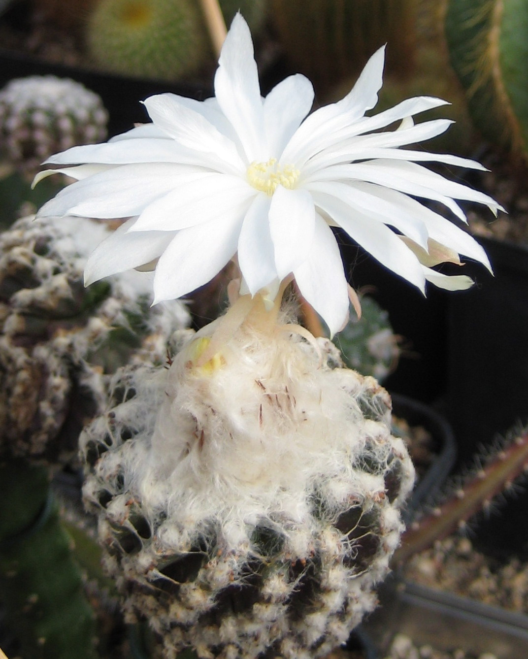 Discocactus horstii in Kultur